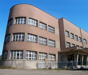 Budova školy ve městě Niš, Srbsko